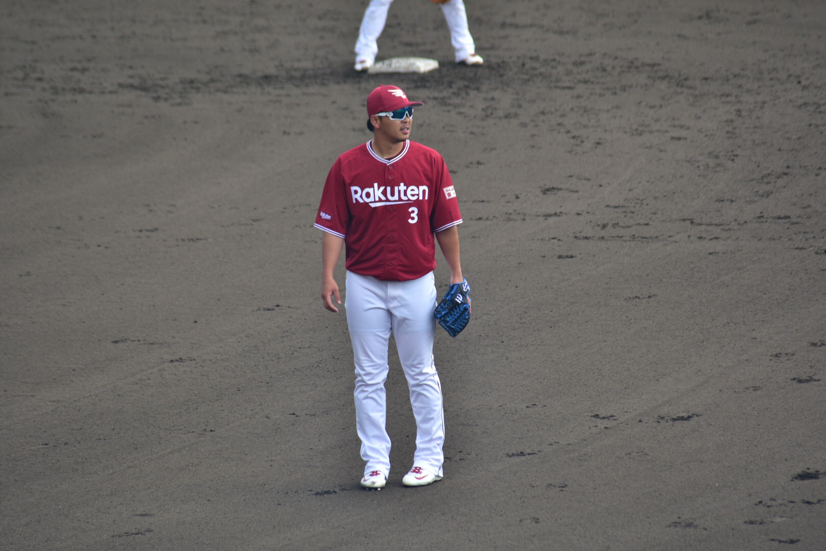 2019年2月23日 沖縄セルラースタジアム那覇で撮影。